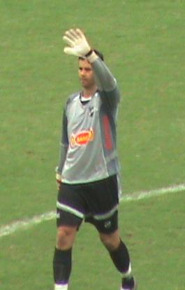 De keeper van ABC FC.